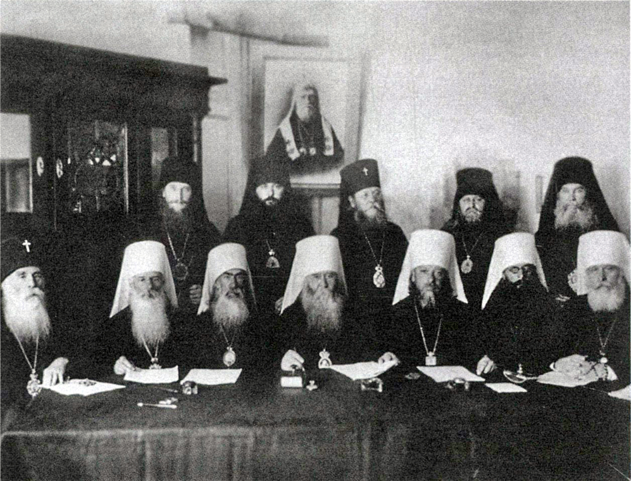 Заседание Временного Патриаршего Священного Синода. 1932 год. Сидят: Архиепископ Полтавский Николай (Пирский) митрополит Ярославский Павел (Борисовский) митрополит Ташкентский и Туркестанский Никандр (Феноменов) митрополит Московский и коломенский Сергий (Страгородский) митрополит Ленинградский Алексий (Симанский) митрополит Одесский Анатолий (Грисюк) митрополит Харьковский Константин (Дьяков) Стоят: епископ Калужский Павлин (Крошечкин) архиепископ Дмитровский Питирим (Крылов) архиепископ Иваново-Вознесенский Павел (Гальковский) епископ Брянский Даниил (Троицкий) епископ Сталинградский Петр (Соколов) Архиепископы Алексий, Анатолий, Павел и Константин возведены в сан митрополита 21 октября 1932 года в ознаменование 5-й годовщины существования Временного Патриаршего Священного Синода. Видимо, этот торжественный момент и отражён на фотографии. Таким образом, остаётся предположить, что по каким-то причинам архиепископ Питирим предпочитал носить епископское облачение несколько месяцев спустя принятия сана архиепископа.